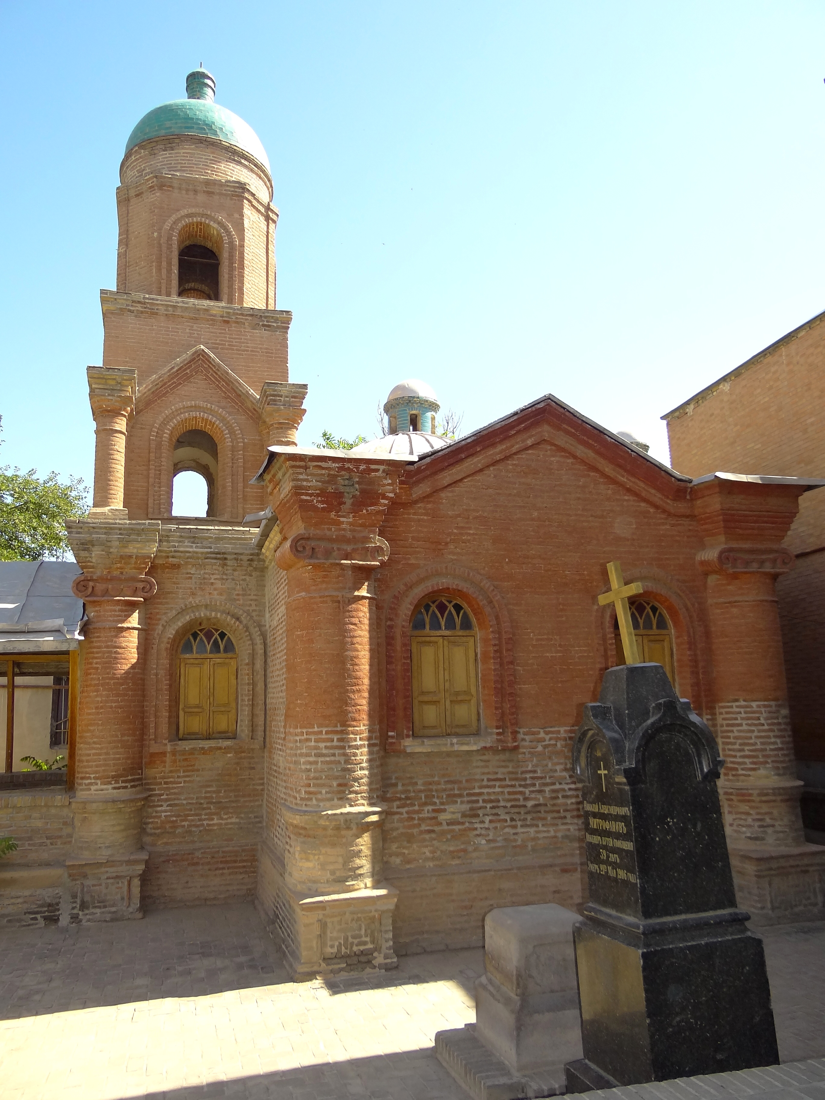 Kantur Church - Qazvin - Northwestern Iran